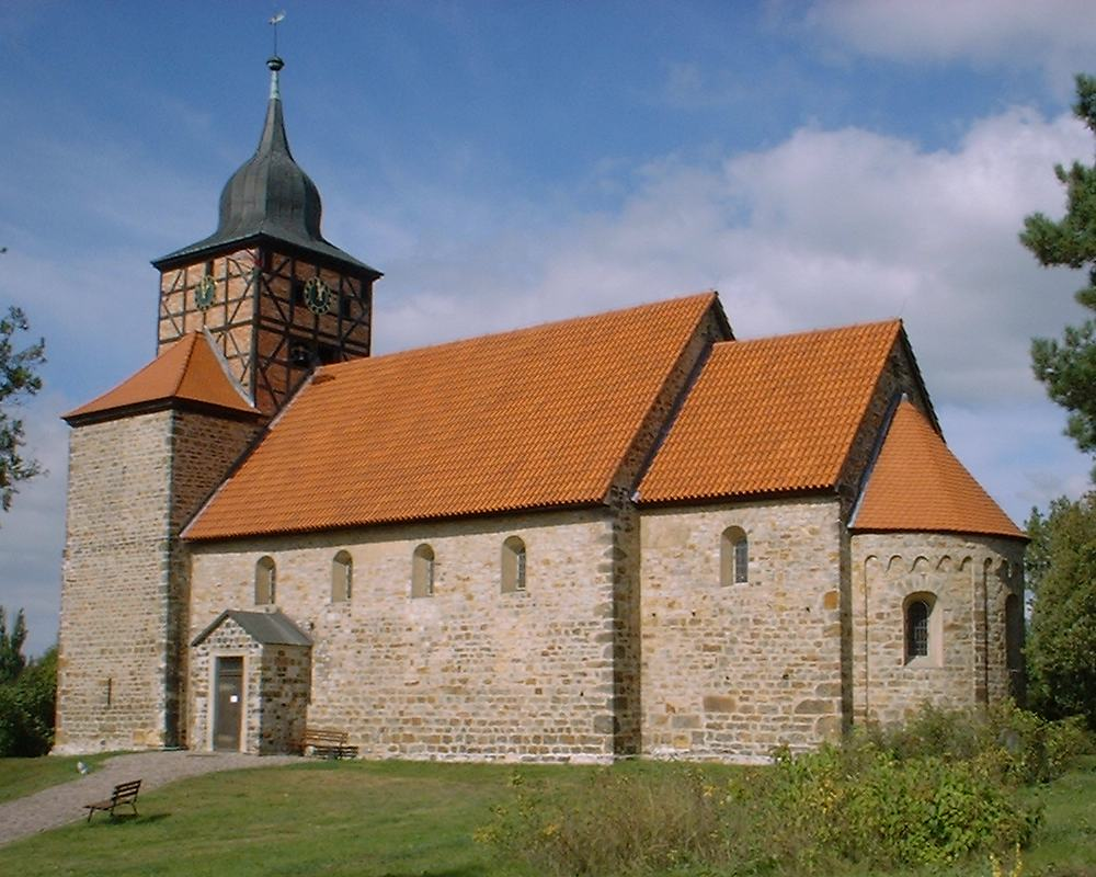 Dorfkirche St. Thomas in Pretzien